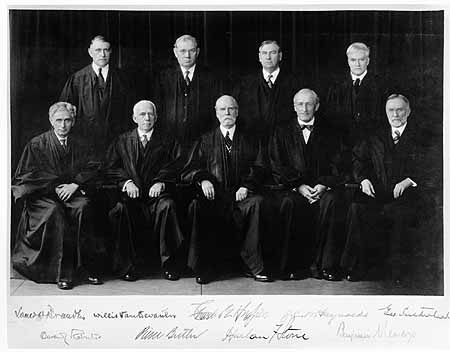 U.S. Supreme Court, 1932